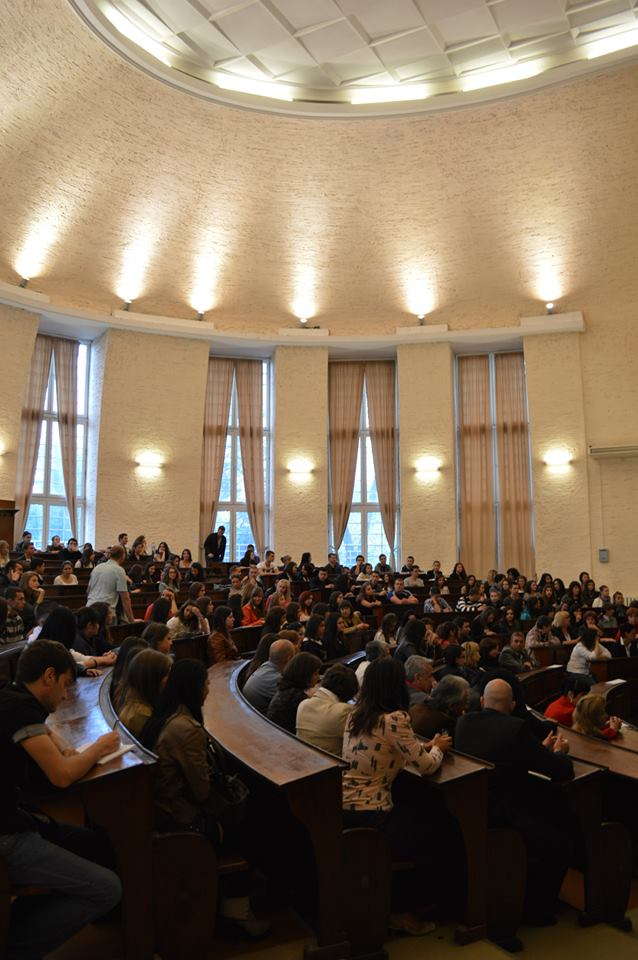 Голямата аула